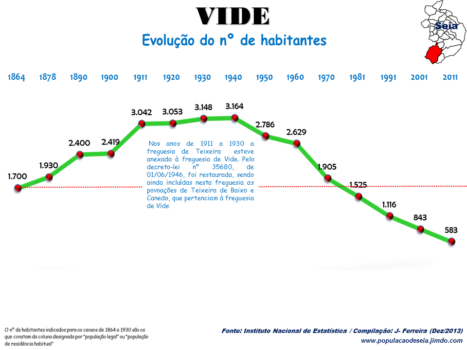 Evolução da População 1864 / 2011